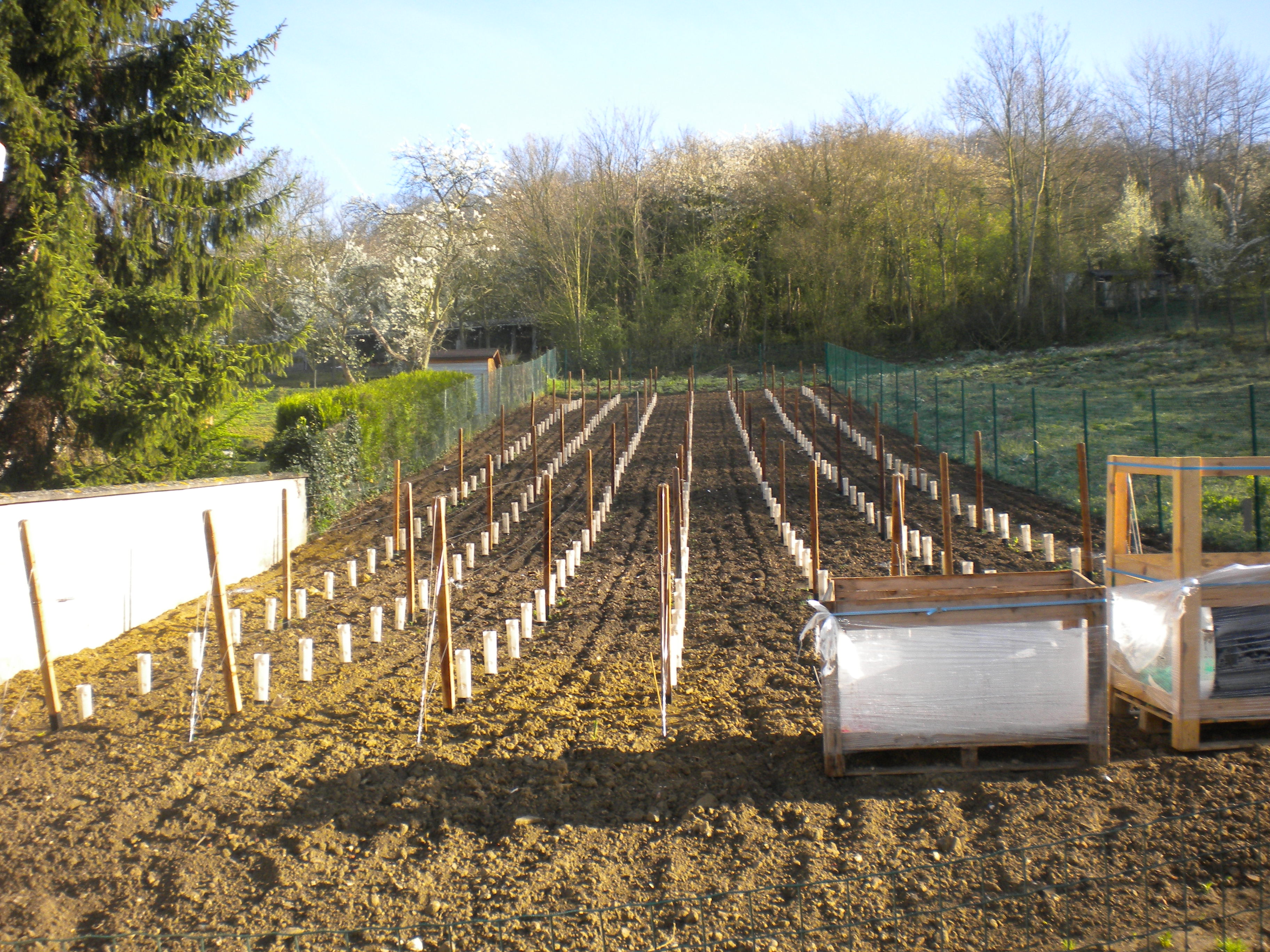 Photo prise peu après la plantation en avril 2011